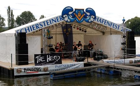 Schwimmende Bühne des Verschönerungsvereins beim Hafenfest am zweiten Juli-Wochenende